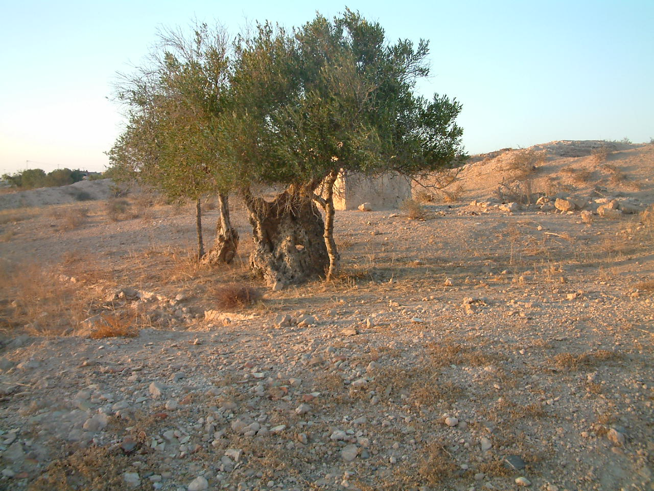 Olivier séculaire à Djerba